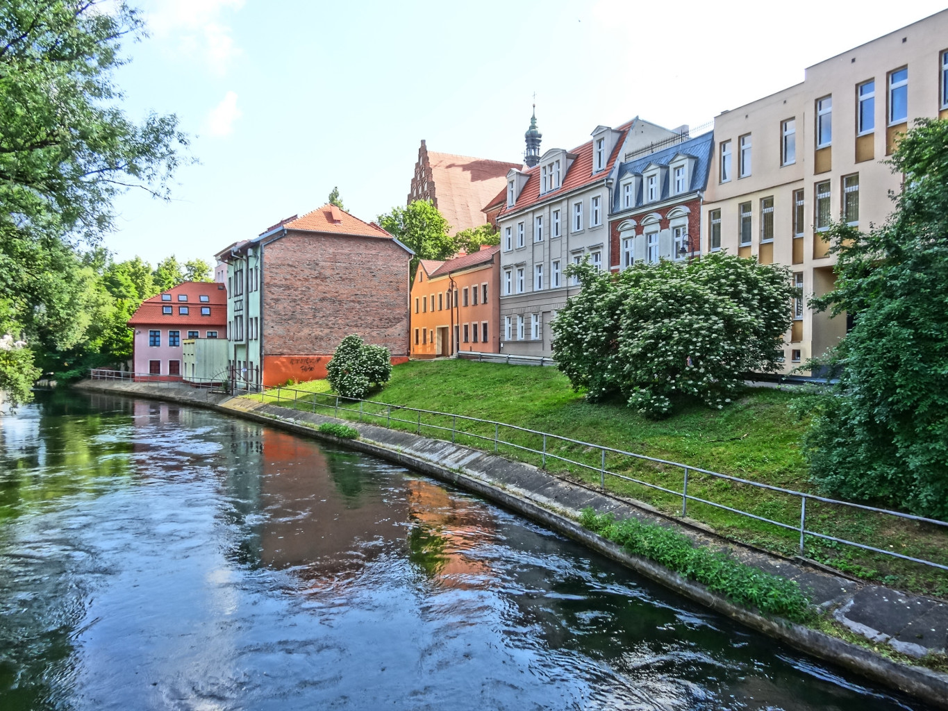 Wenecja Bydgoska – zespół architektoniczny Starego Miasta w Bydgoszczy zbudowany bezpośrednio nad rzeką Młynówką.